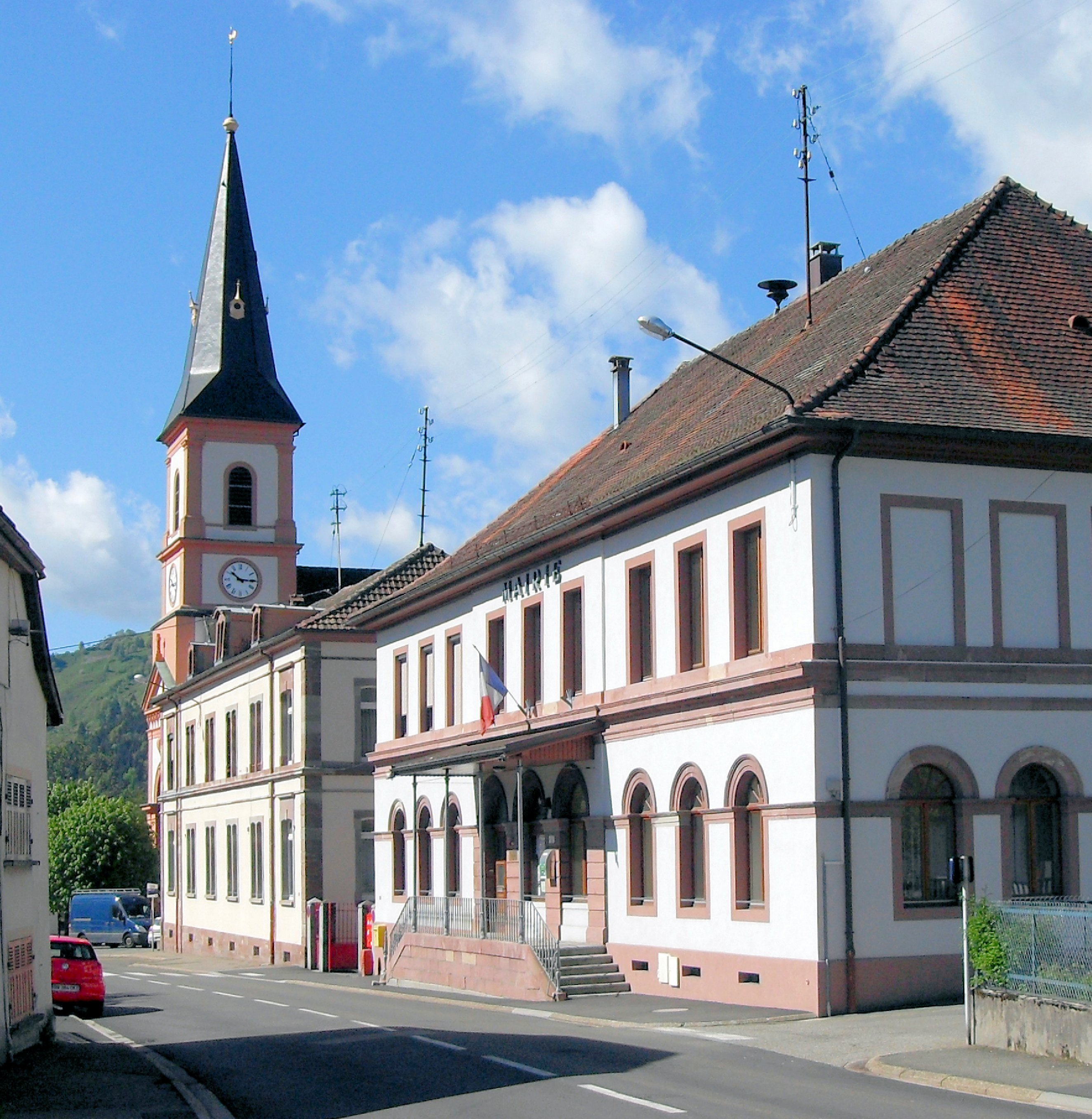 La mairie de Kruth